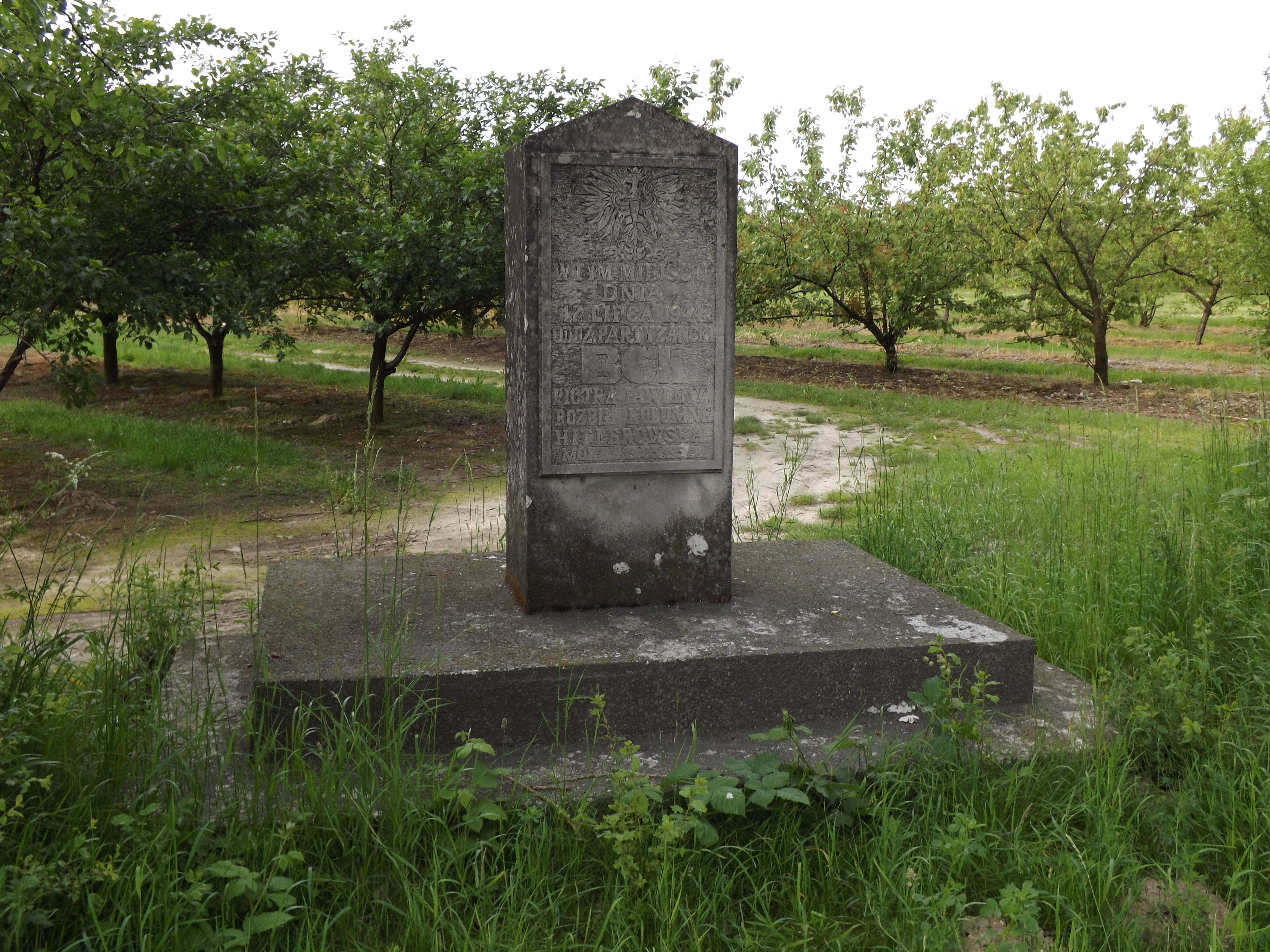 Mokre pomnik Bataliony Chłopskie